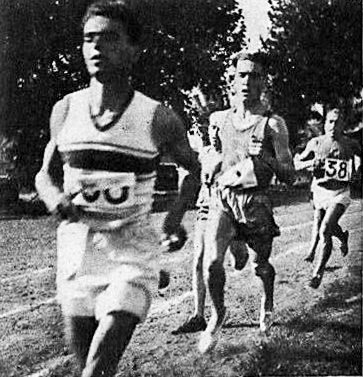 Bei engem Tournoi zu Belfort.Original caption: "A.Z. AKTUALITÄTEN -- Hemmer liegt hier an 2. Stelle im 1500-Meter-Lauf, den er sicher gewann."